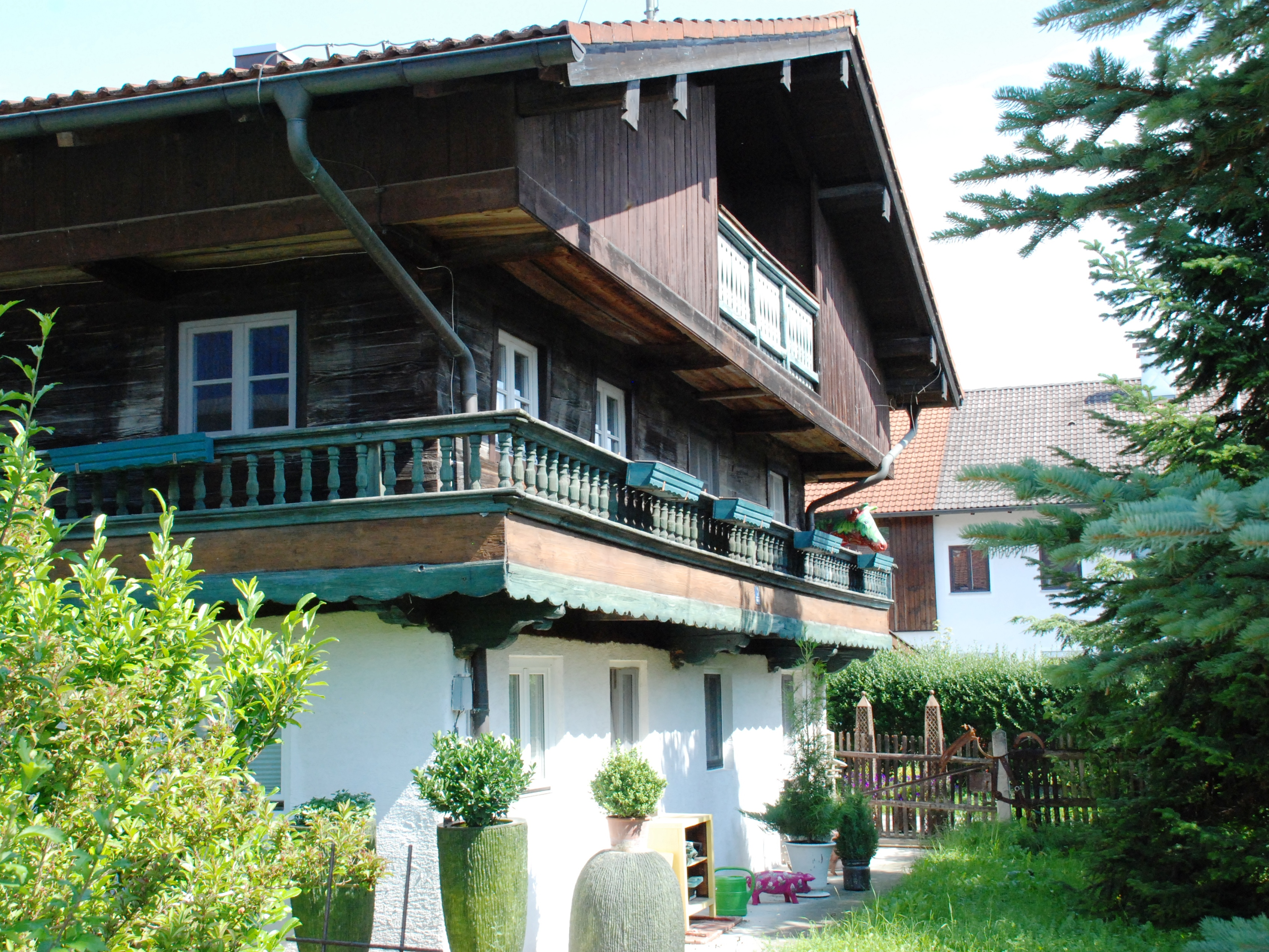 Ehemaliges Bauernhaus "Beim Krämer" in der Höhenkirchener Straße 3 in Hofolding, Gemeinde Brunnthal, Landkreis München, Regierungsbezirk Oberbayern, Bayern. Als Baudenkmal in der Bayerischen Denkmalliste aufgeführt. Foto gemäß den Voraussetzungen zur Panoramafreiheit von öffentlicher Verkehrsfläche aus aufgenommen.